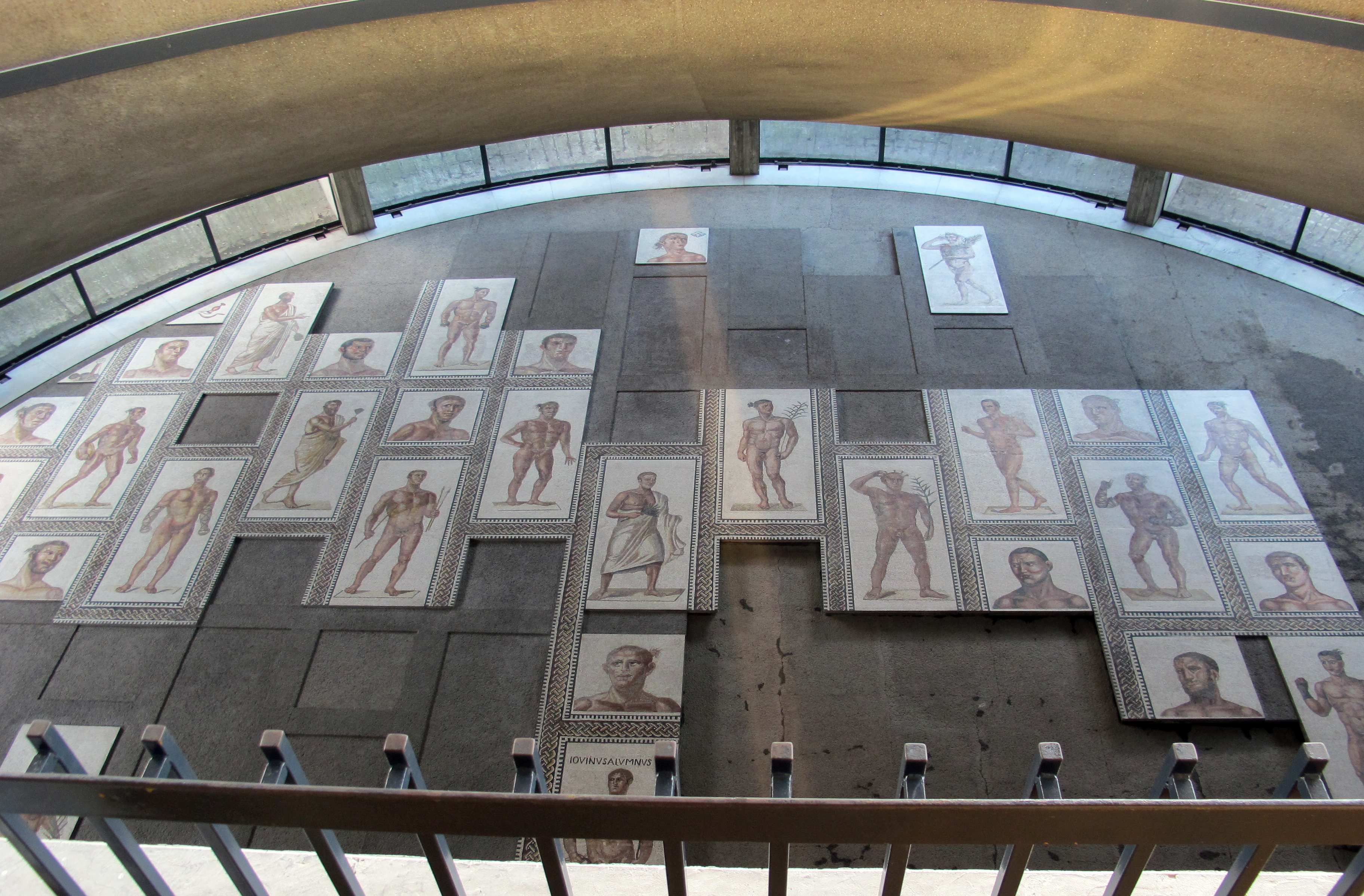 Museo Pio Cristiano